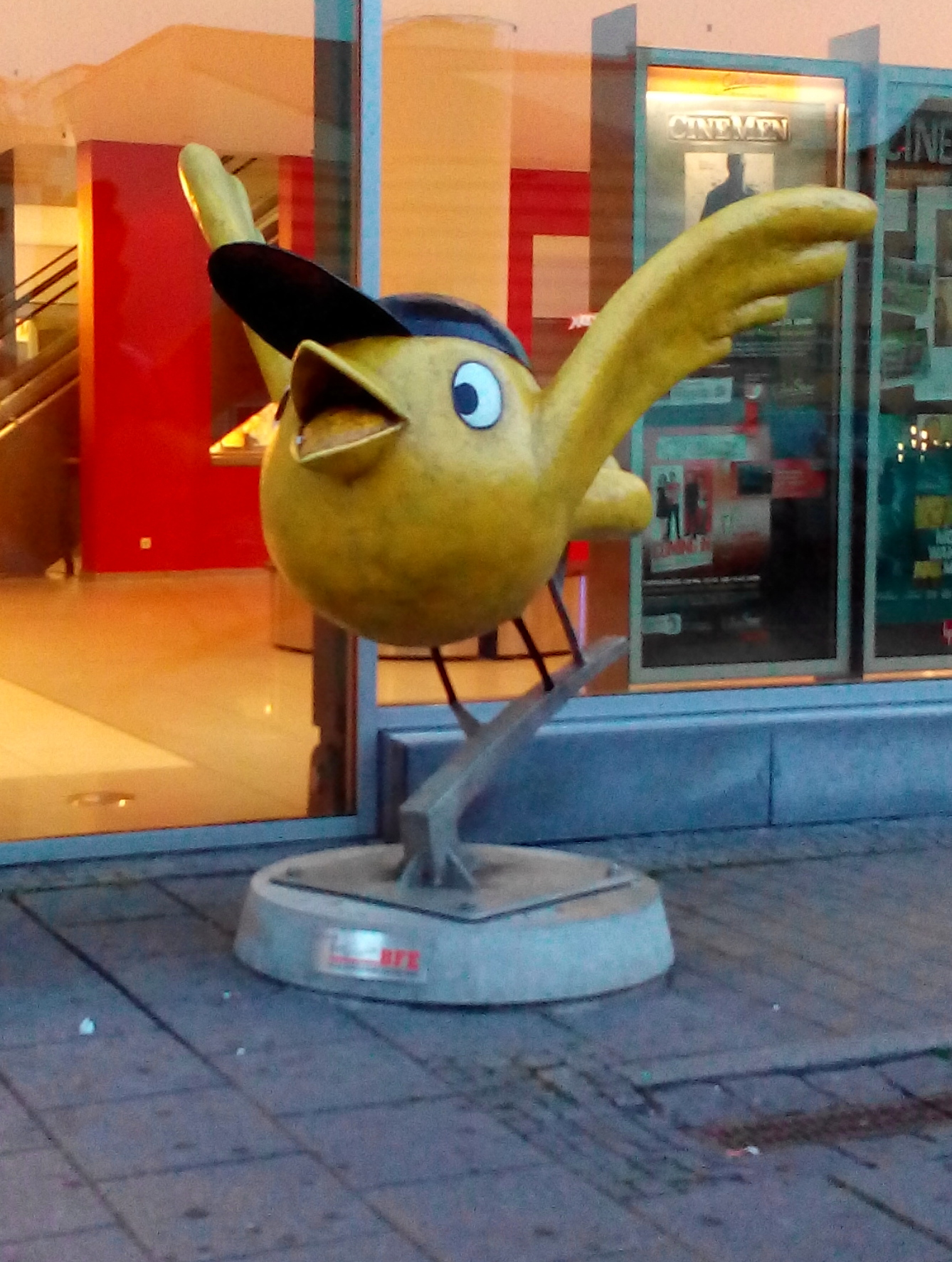 Der Goldene Spatz vor dem Eingang des Erfurter F1 mit dem Kino.